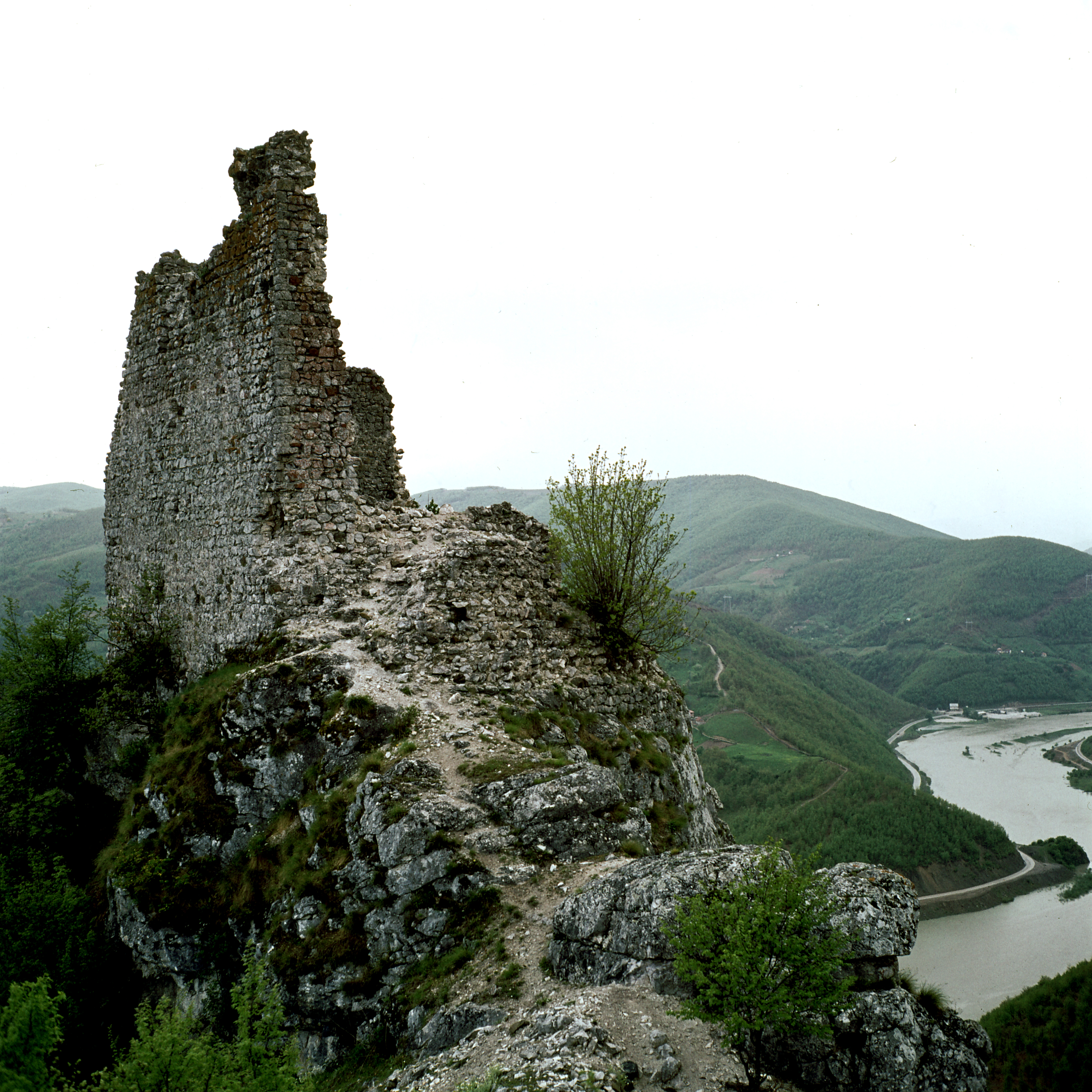 Град се налази на стени изнад реке Лим.